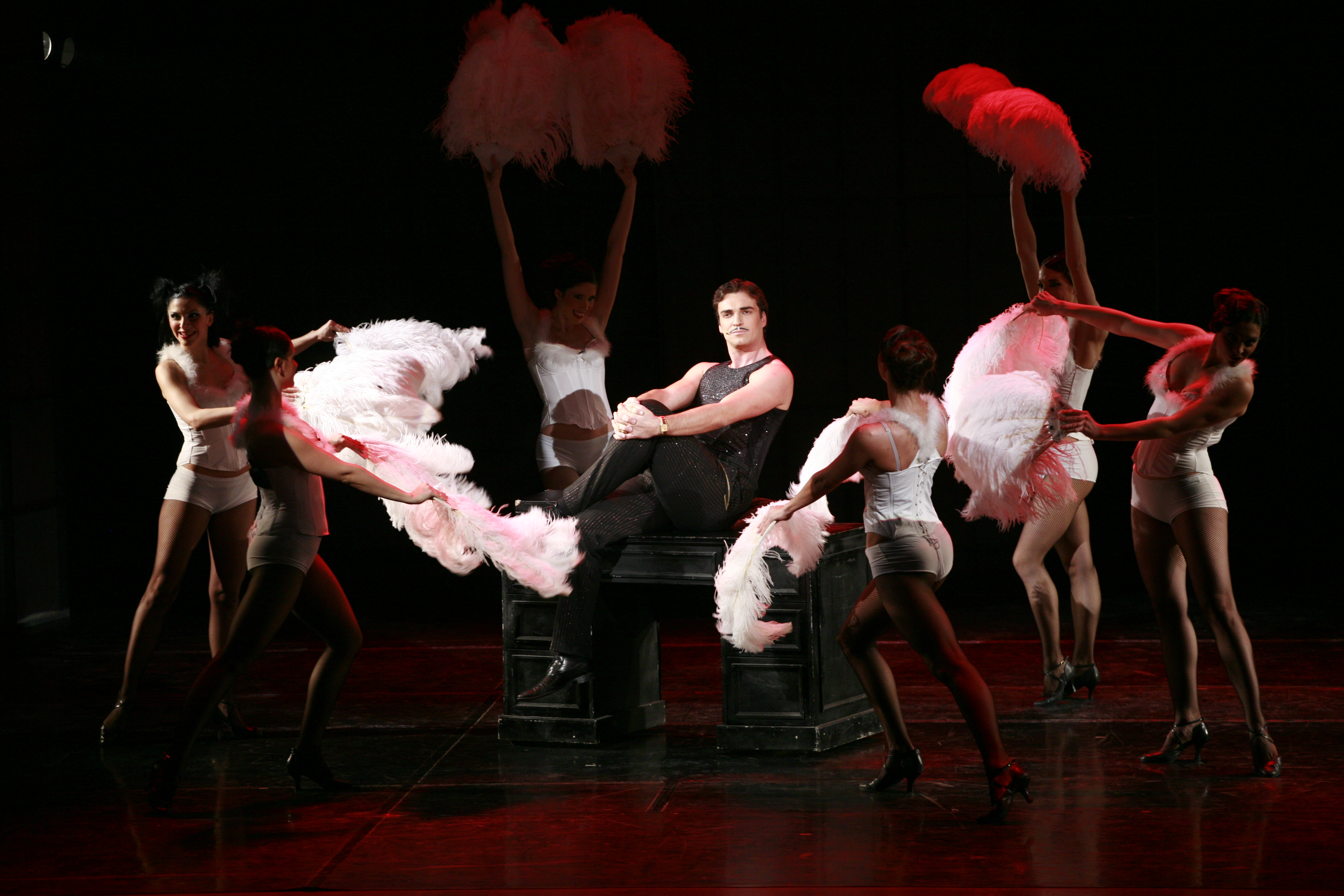 Stoto izvodjenje mjuzikla "Čikago"